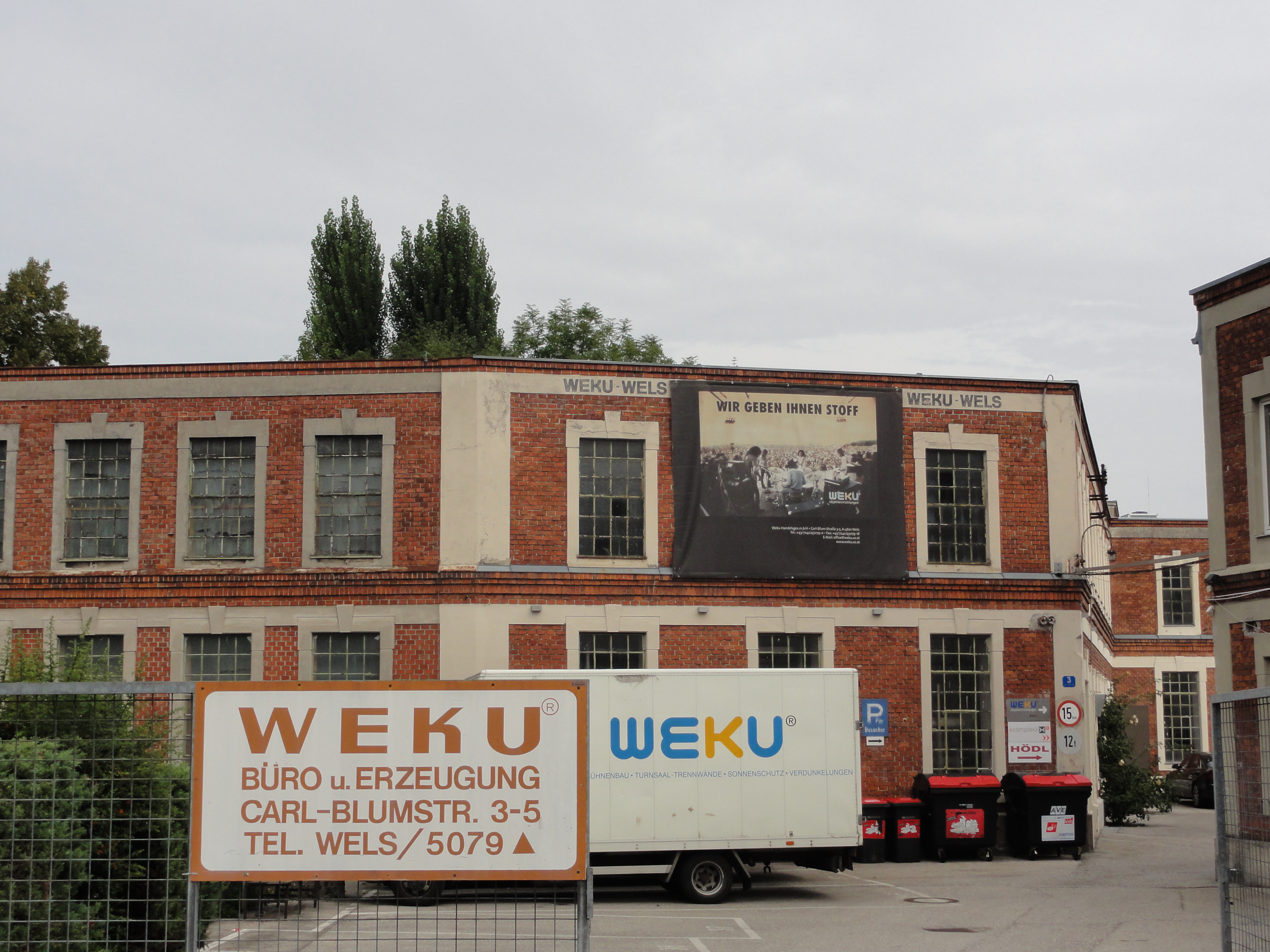 Ehem. Hutfabrik Blum Carl Blum workshop, built in 1874 and used as a hat factory until 1935. Today, the building houses several manufacturing and trading companies. Built after the musician's death.